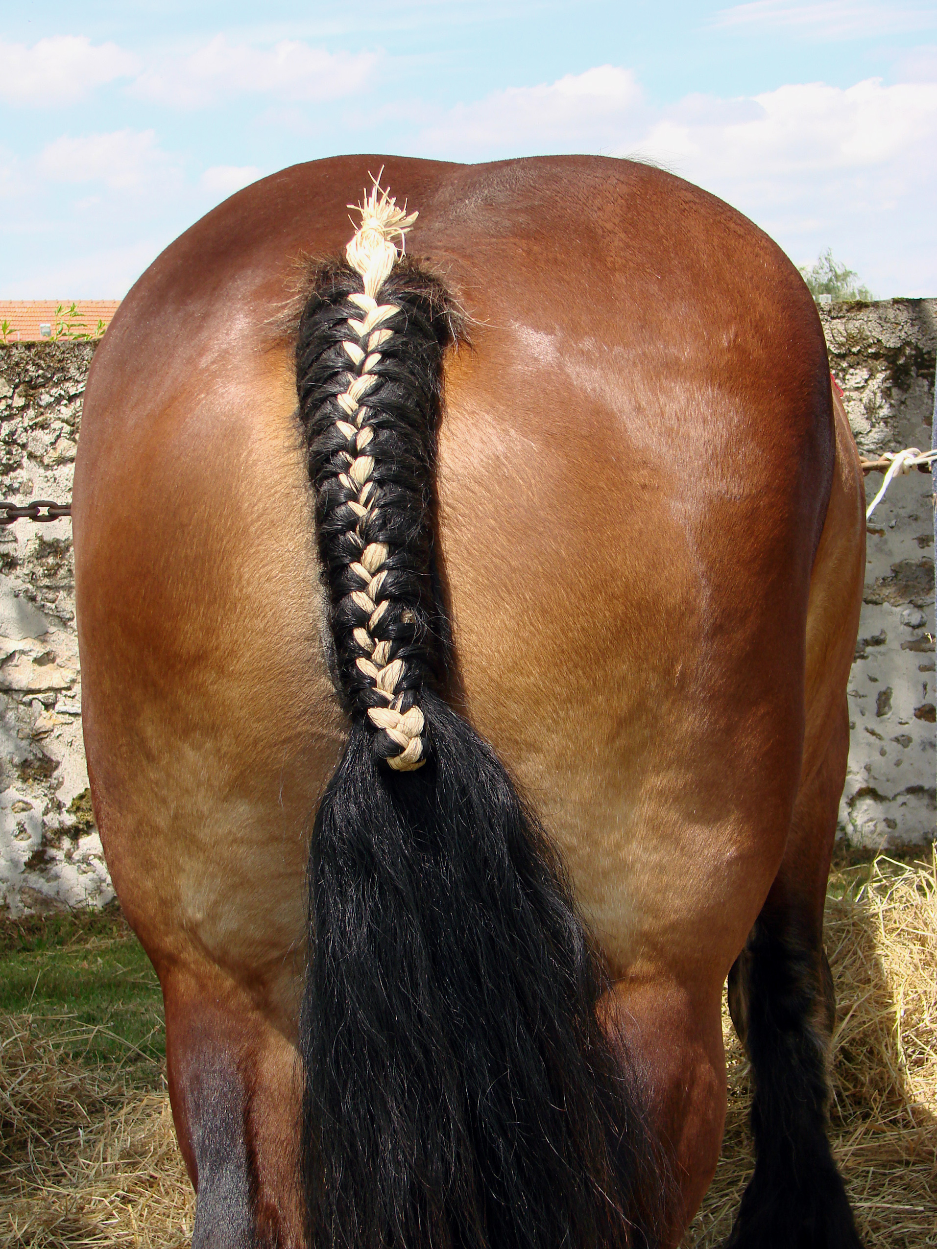 Queue tressée.